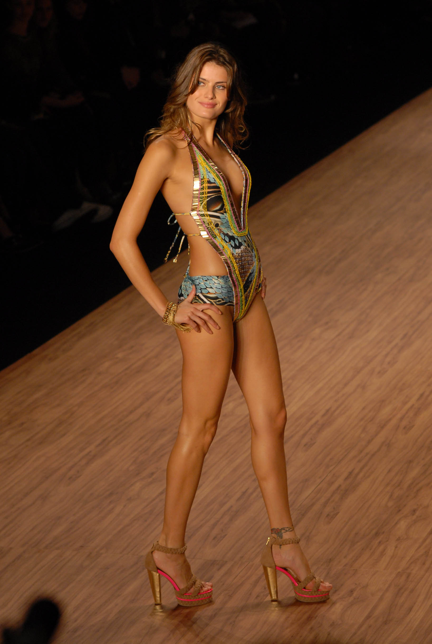 Foto: Marcos Madi